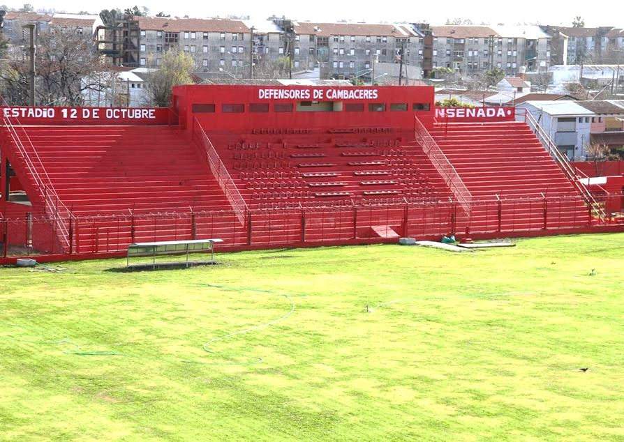 Cancha del Club Defensores de Cambaceres, vacía